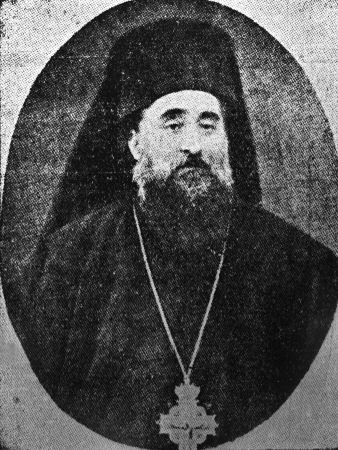 Германо Михаилидис